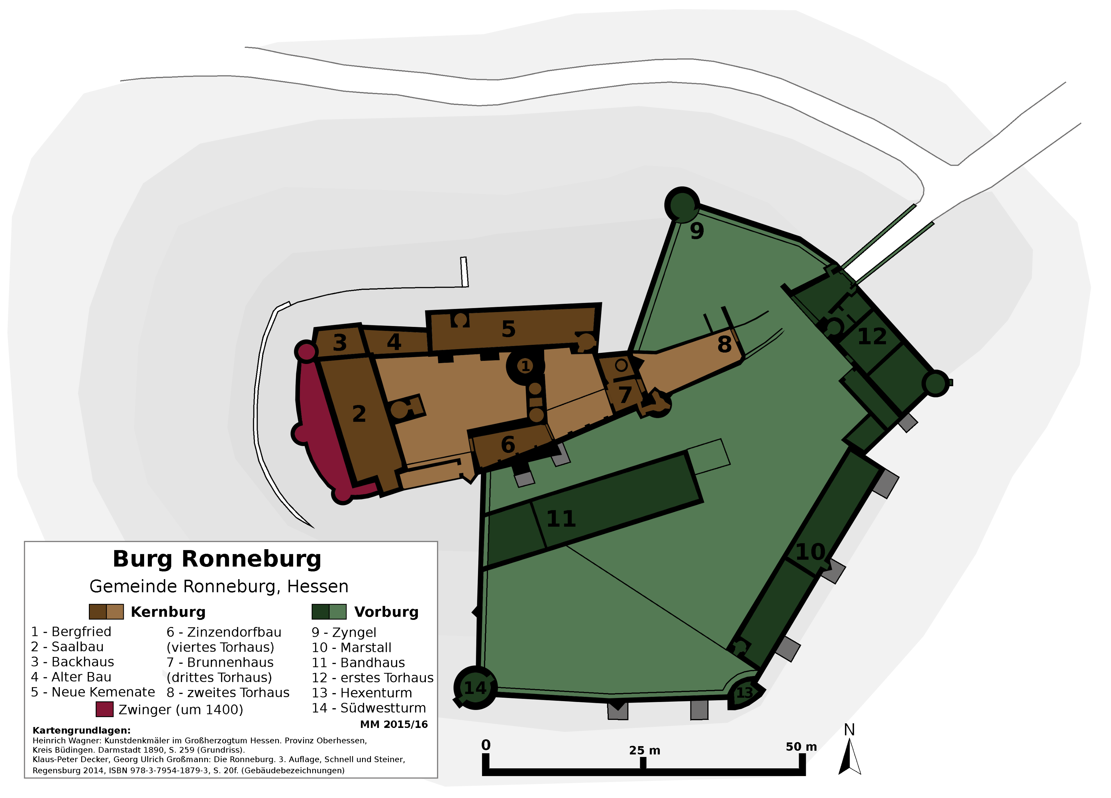 Grundrissplan der Burg Ronneburg, Gemeinde Ronneburg, Main-Kinzig-Kreis in Hessen.